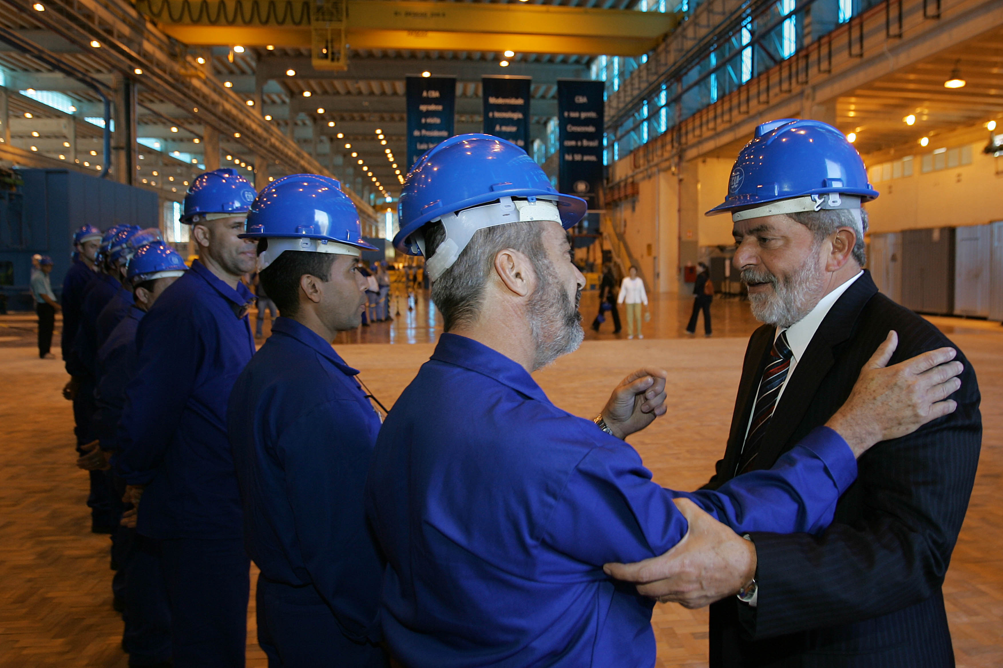 Alumínio / SP - Presidente Lula visita a fábrica da Companhia Brasileira de Alumínio, acompanhado por funcionários da empresa.